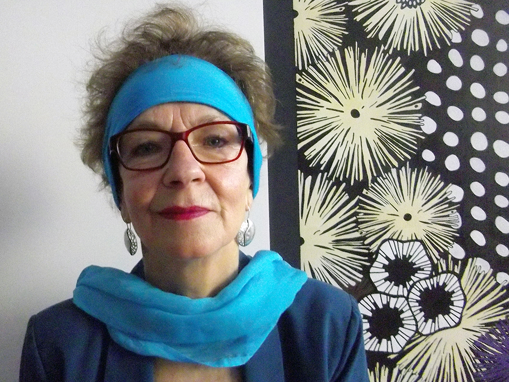 Die österreichische Bildende Künstlerin Helga Schager vor einem ihrer Kunstwerke